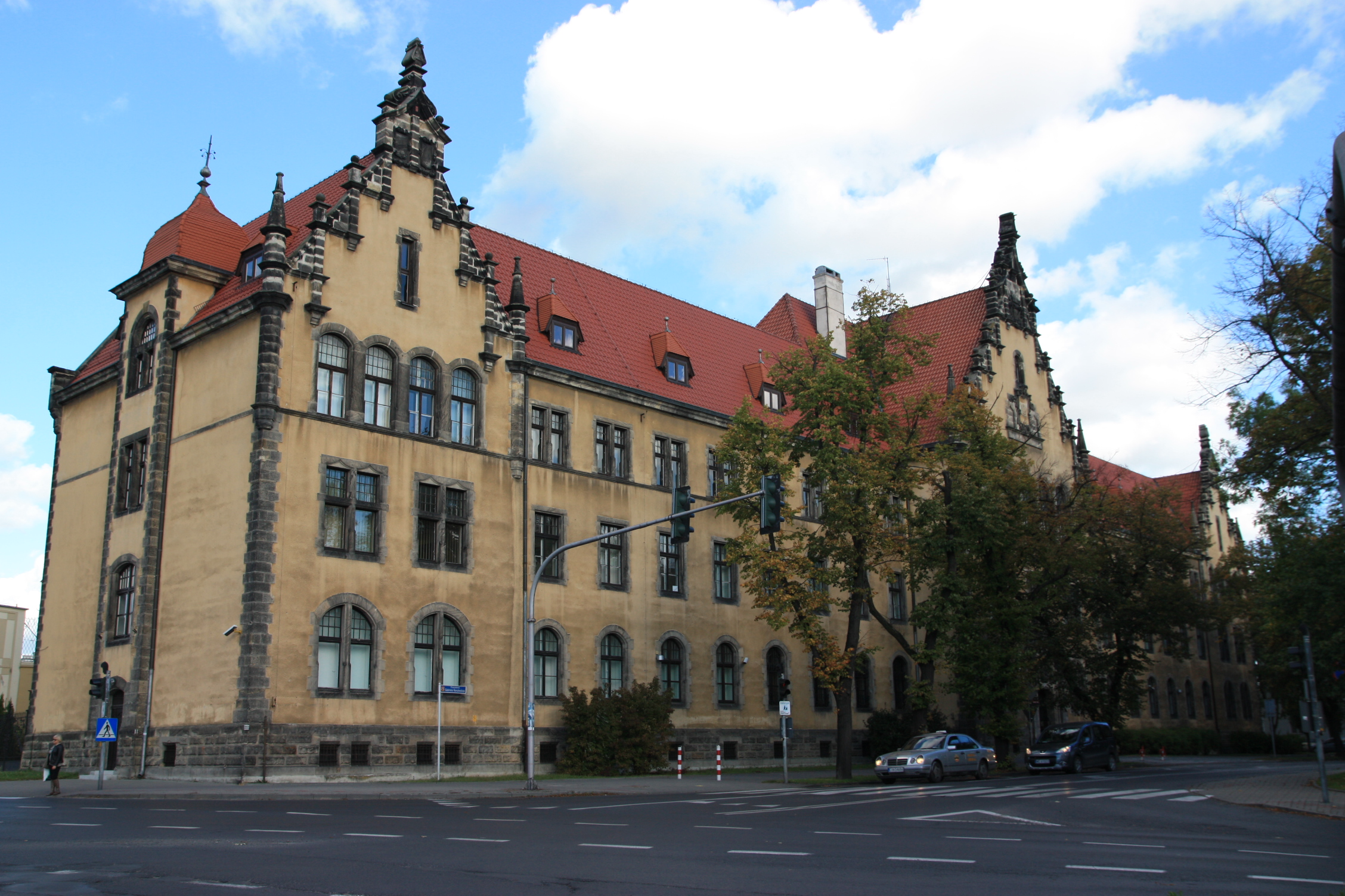 Inowrocław, ul. Narutowicza 42 - sąd rejonowy